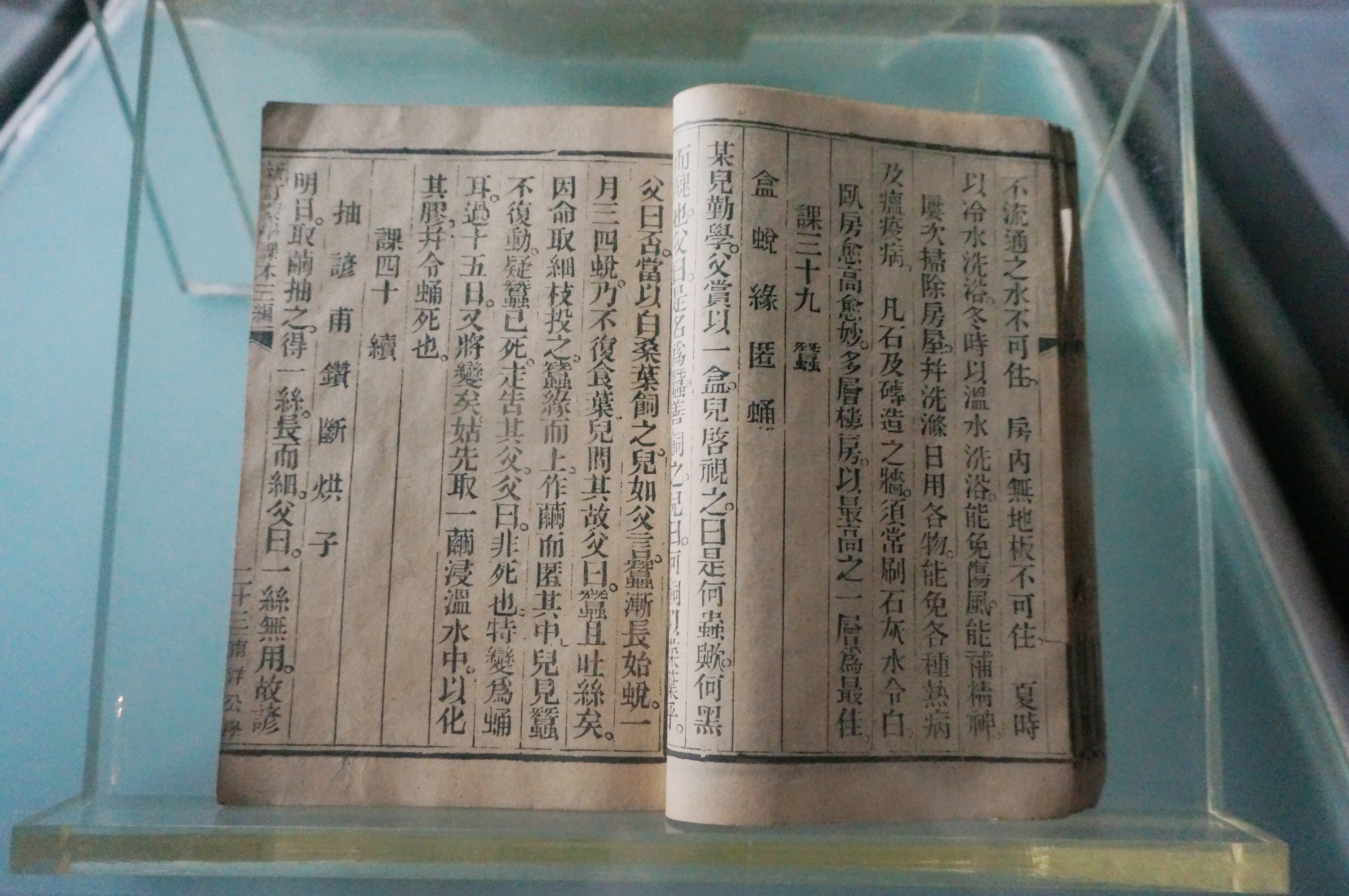 南洋公学课本《新订蒙学课本》，清光绪二十七年（1901），杭州求是书院藏。